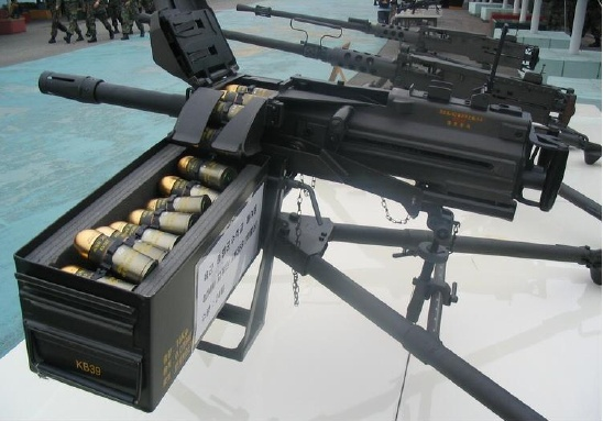 대한민국의 국산 고속유탄발사기 K-4